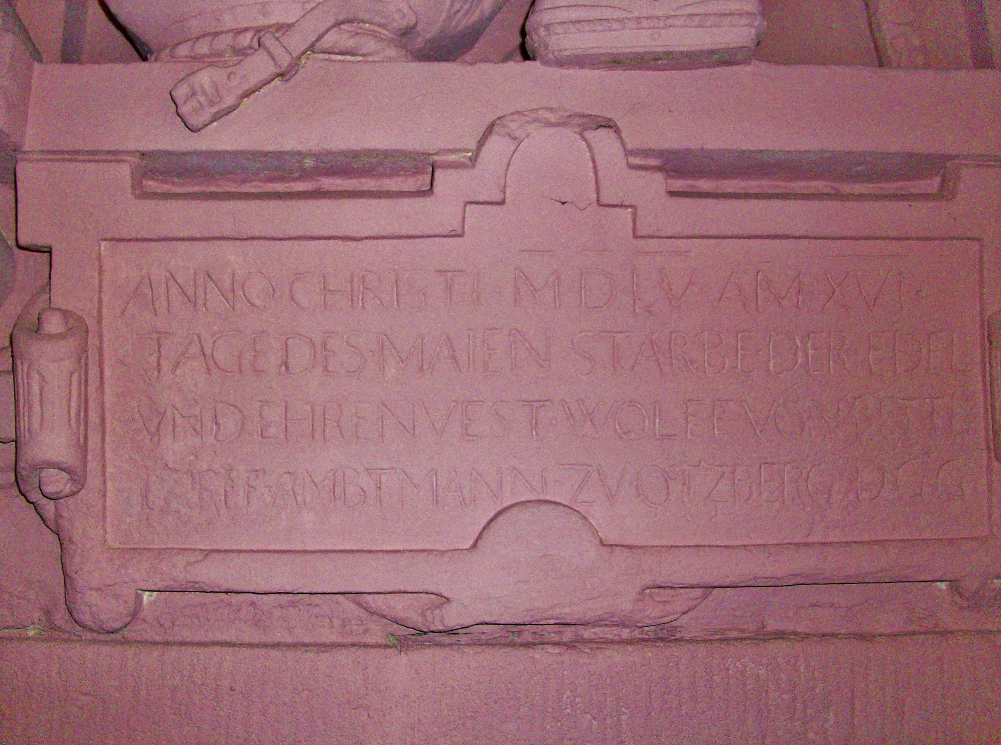 Text im unteren Schild des Epitaphs von Wolf von Bettendorf in der Stadtkirche von Groß-Umstadt